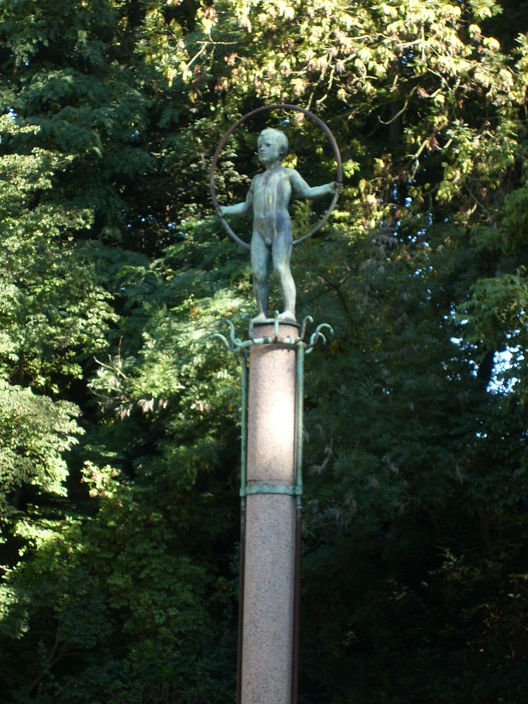 Skulptur Knabe mit Reifen (1930) in den Lübecker Wallanlagen